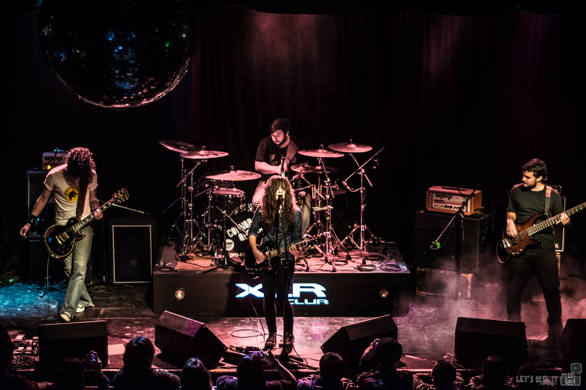 El gripo de rock alternativo argentino, Connor Questa en vivo, en 2014.